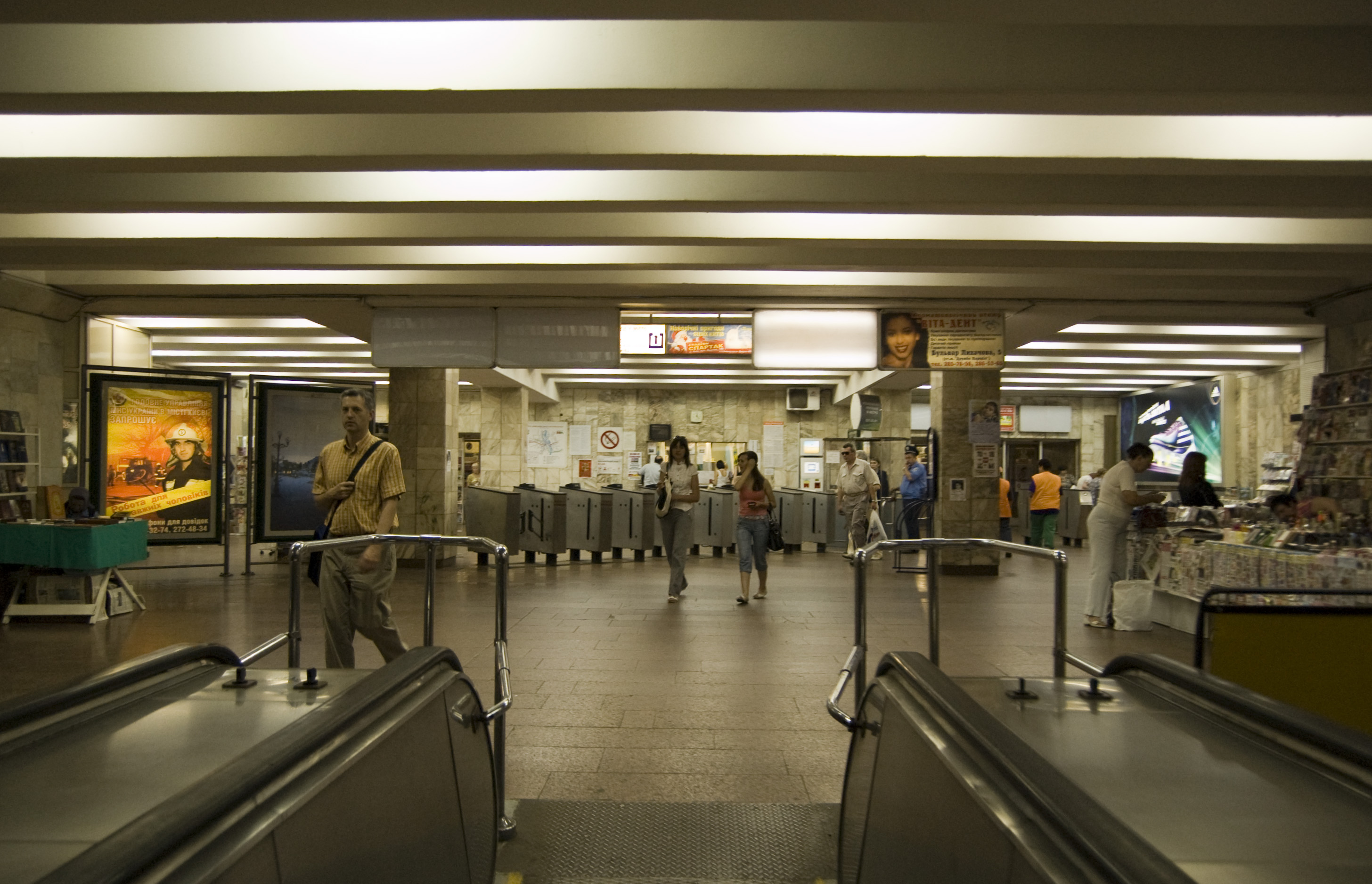 Cтанция метро «Дружбы Народов», подземный вестибюль